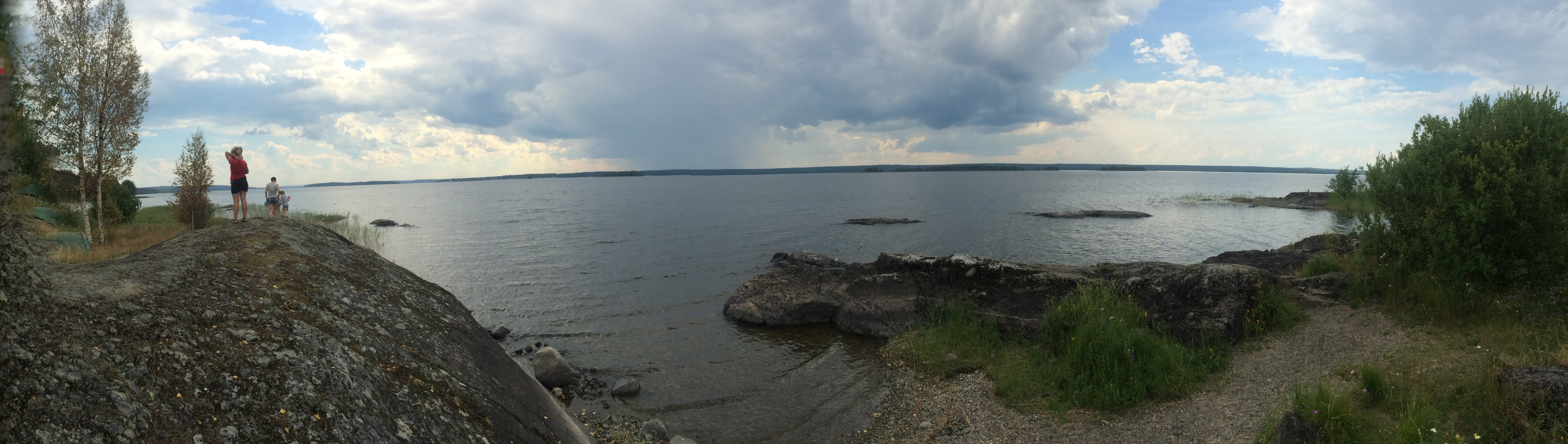 Укшозеро